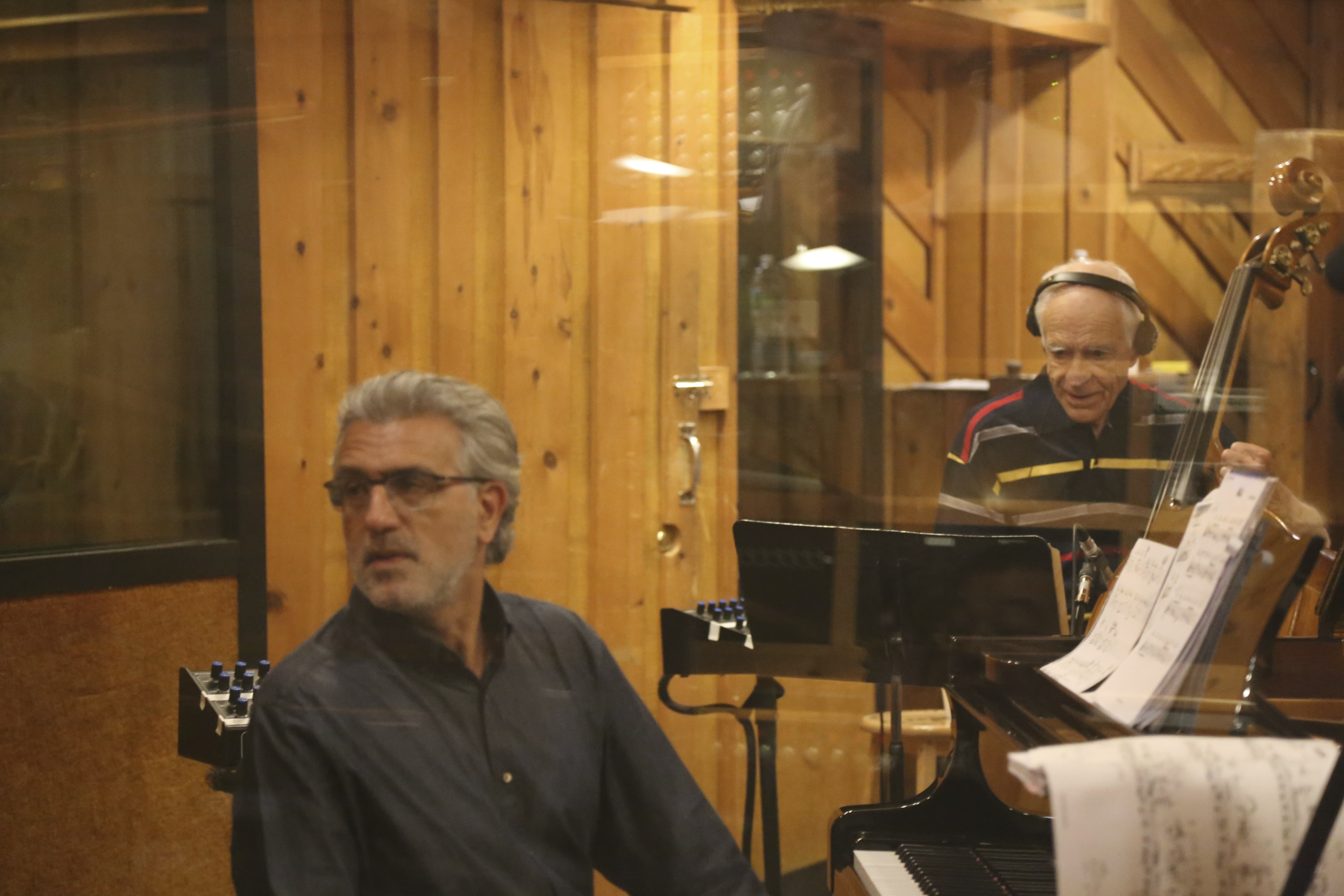 Robert Kaddouch & Gary Peacock au studio Avatar de New York, pour l'enregistrement de ses deux albums "53rd Street" et "High Line"